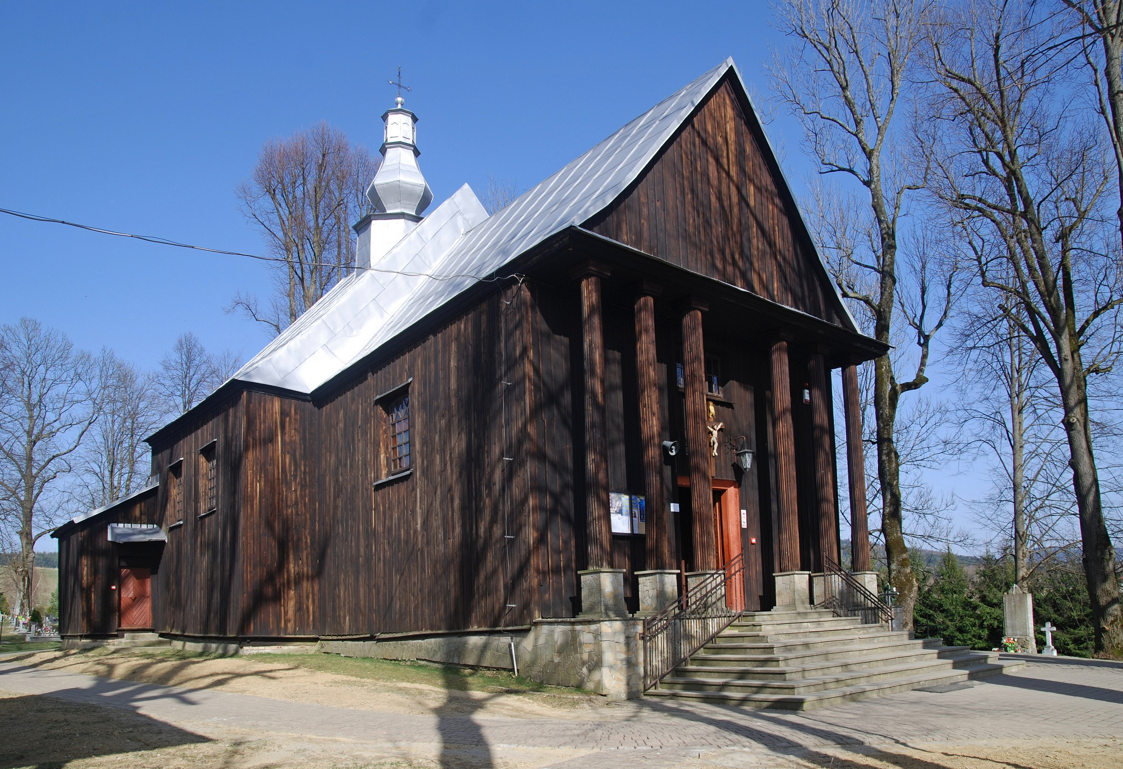 wieś Czarna, cerkiew św. Dymitra Wikidata has entry Q9187575 with data related to this item.